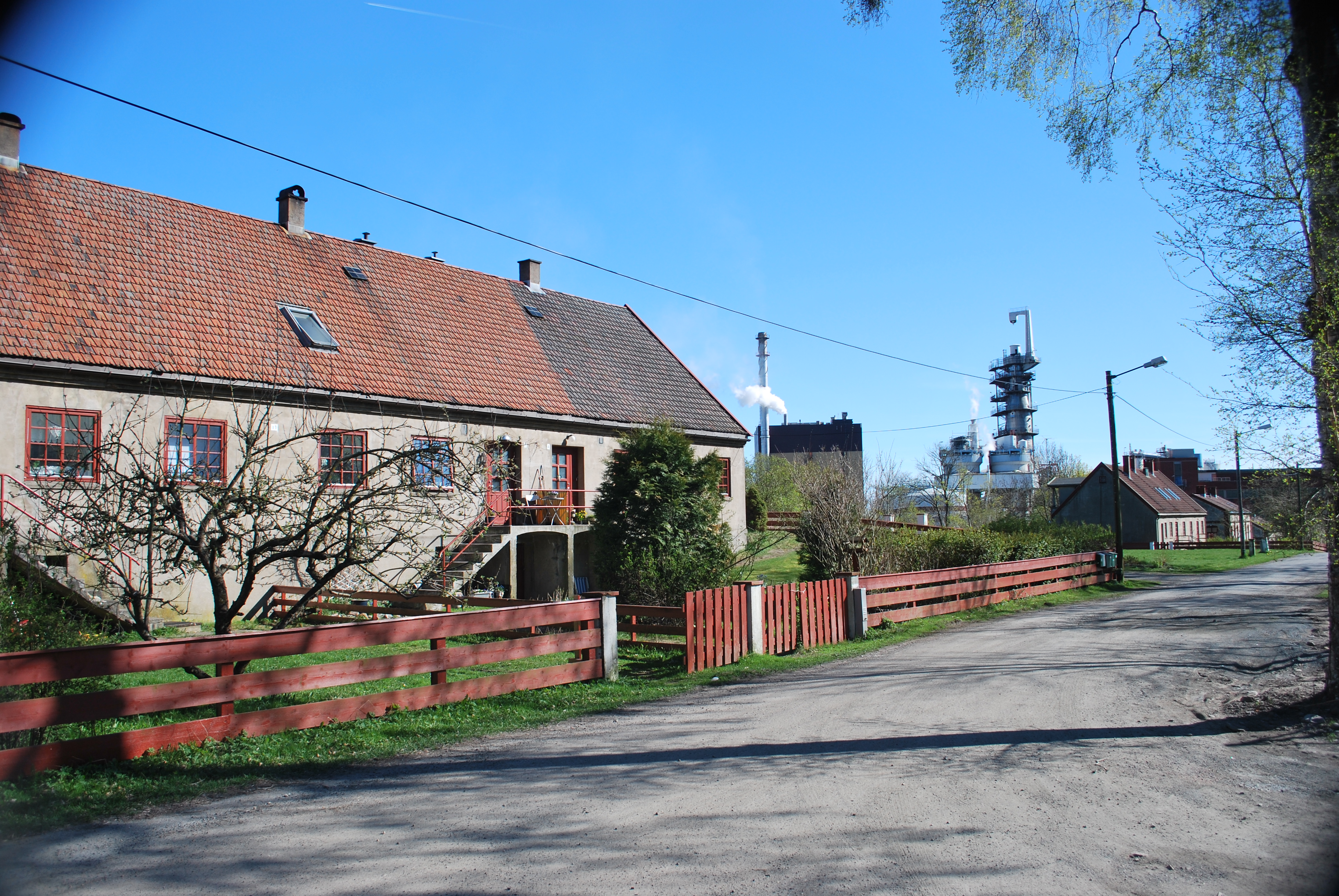 Arbeiderboliger bygget 1905-20 etter hagebyprinsipper, knyttet til Tofte fabrikker, Skogveien, Tofte. Fabrikkområdet i bakgrunnen